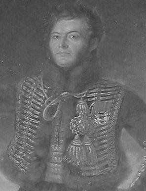 Général_Jacques_Gervais_Subervie